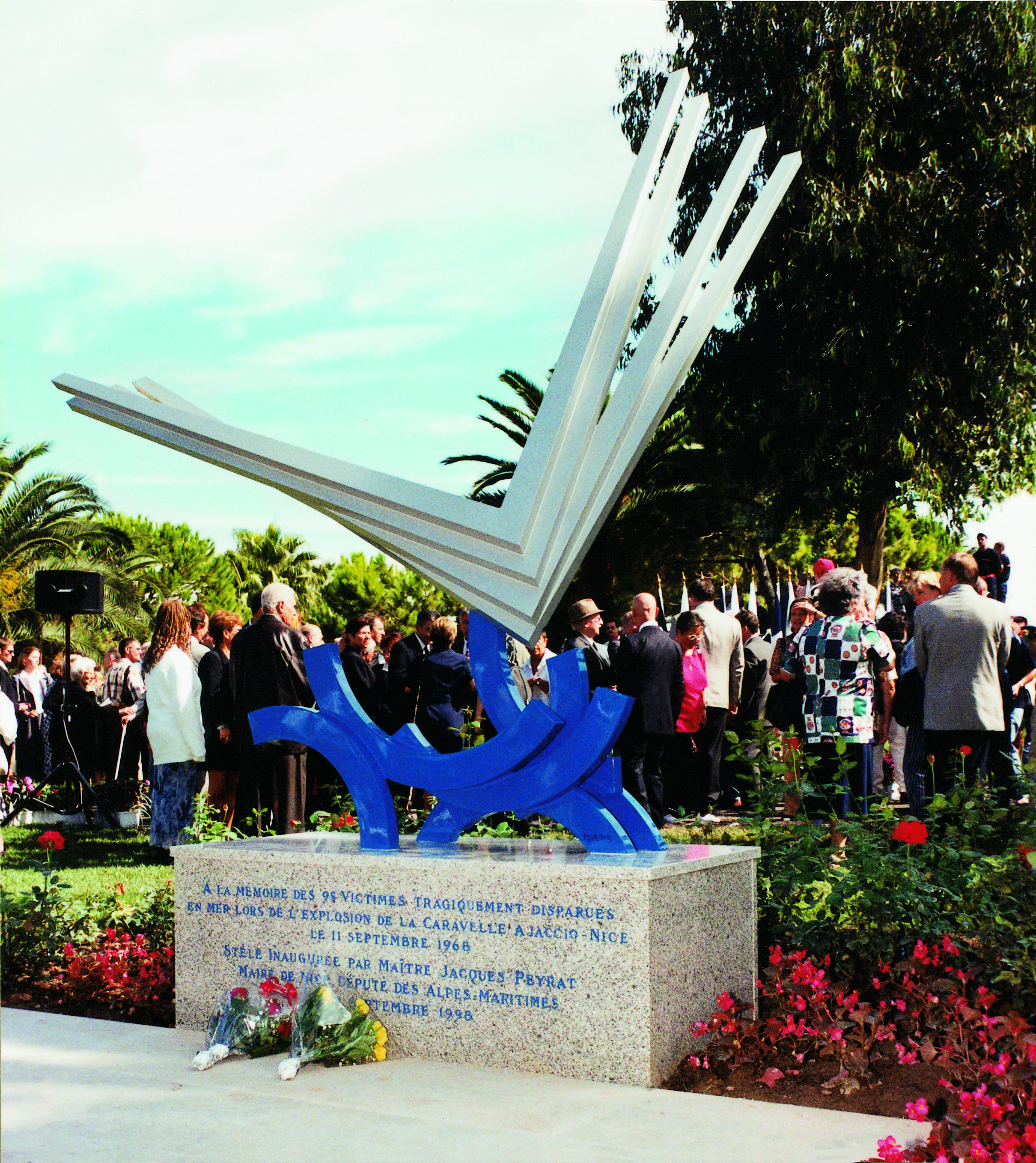 Ce monument est dédié aux morts du crash de la caravelle SE-210 en partance d'Ajaccio et à destination de Nice en septembre 1968. Il se situe à l'extrême fin de la promenade des Anglais, vers l'aéroport Nice Côte d'Azur.